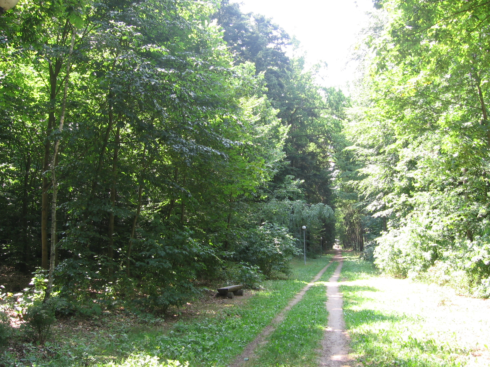 Park Zwierzyniec w Złotowie- Al. Petera Josepha Lennego.